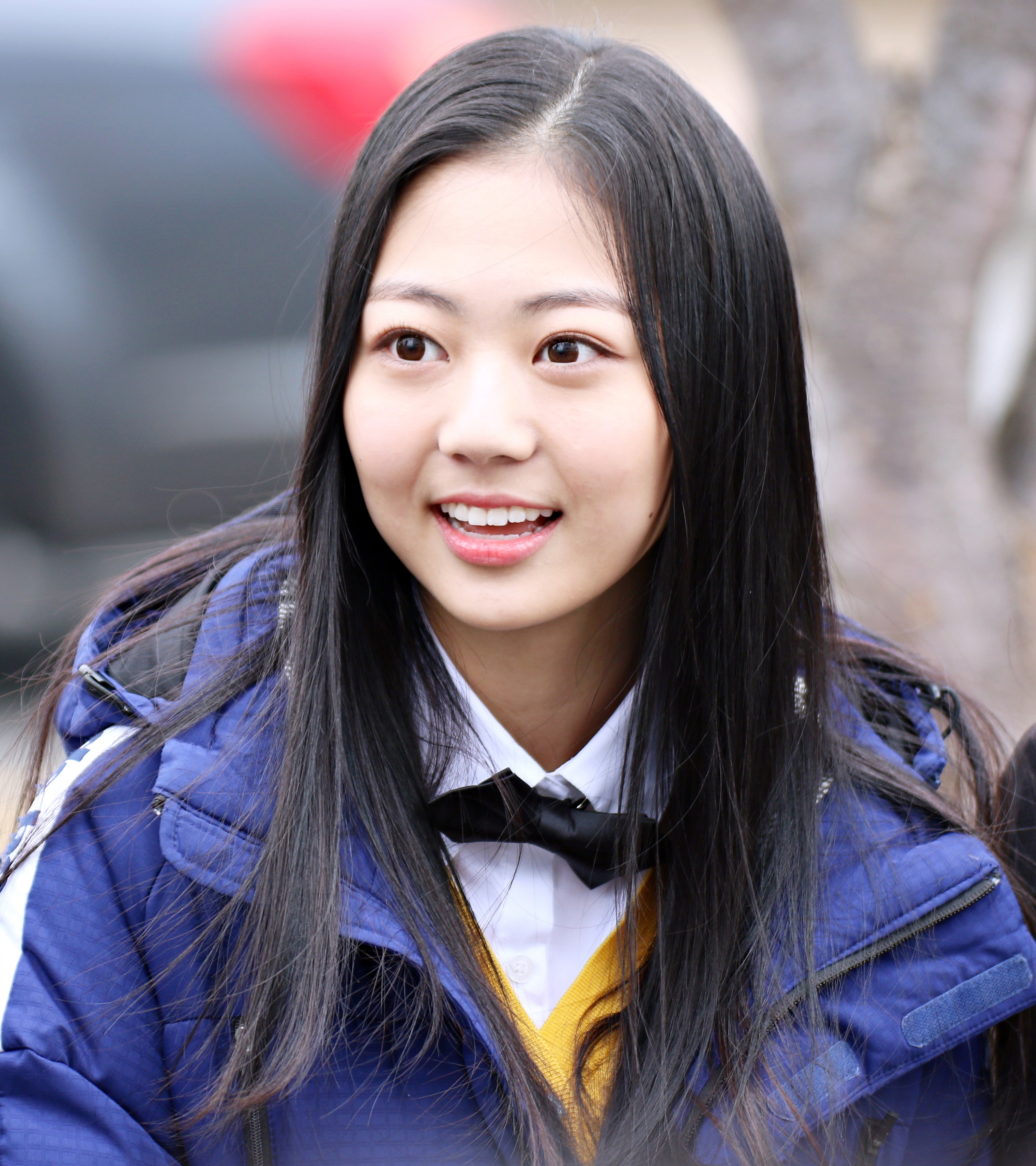 170204 보너스베이비 - 음악중심 팬미팅 Bonusbaby - Music Core fanmeeting (15P)